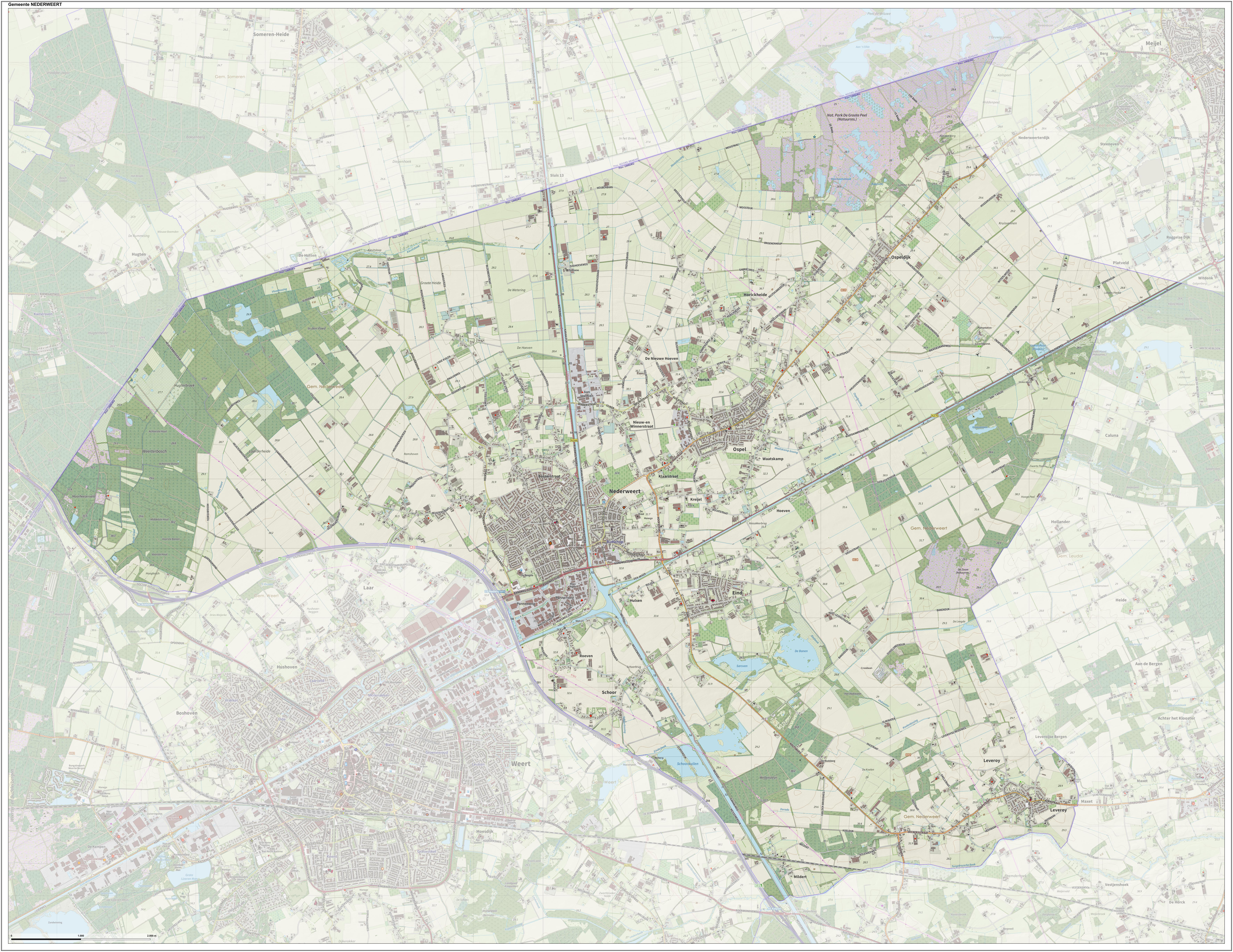 Topografische gemeentekaart. Resolutie: 400 pixels/km. Kaartbeeld samengesteld uit de open geodata van de Top10NL en Top25namen (Kadaster), Creative Commons-BY licentie. Gebouwvlakken uit open geodata BAG extract. Wegen uit de OpenStreetMap, OpenStreetMap community. Reliëfschaduw uit de Actuele Hoogtekaart AHN2. Samenstelling en kleurenschema: Jan-Willem van Aalst, met QGIS. Zie ook de Legenda.